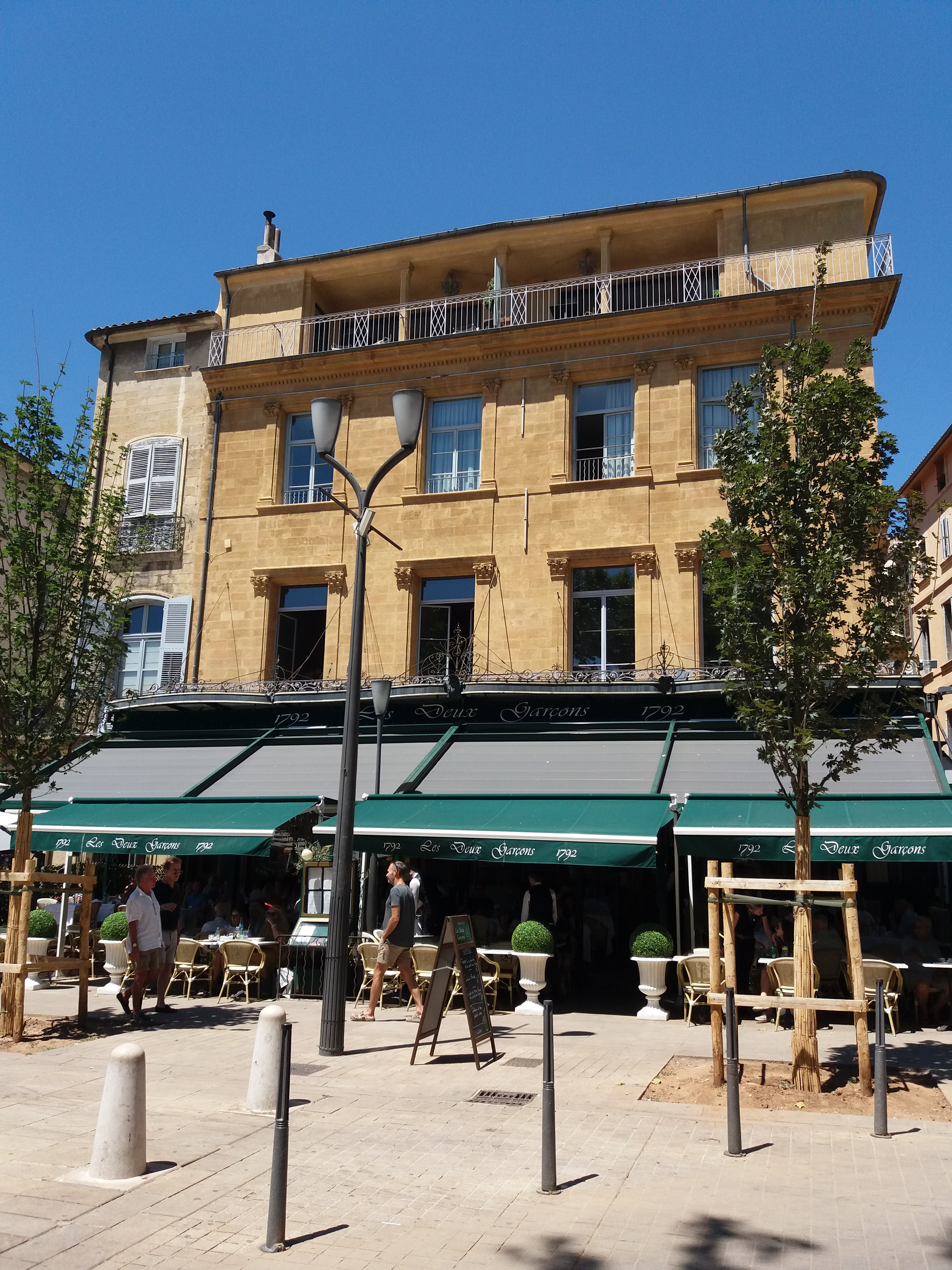 Brasserie Les Deux Garçons à Aix-en-Provence (Bouches-du-Rhône, France)